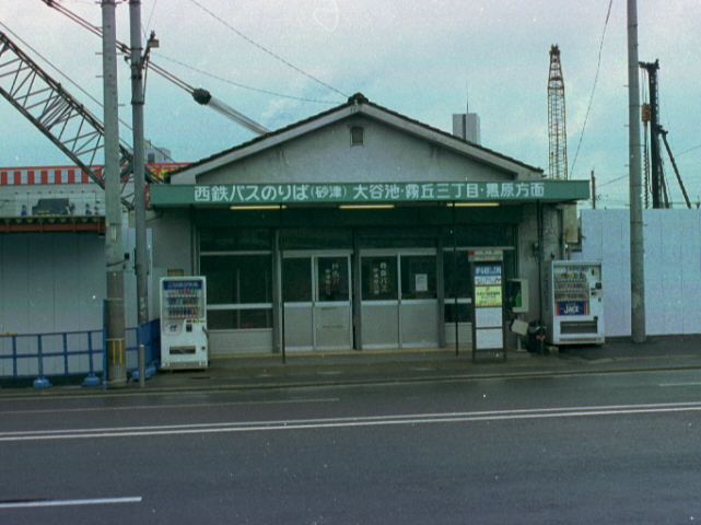 砂津バスセンター上り側 チャチャタウン工事中 2003-9-5